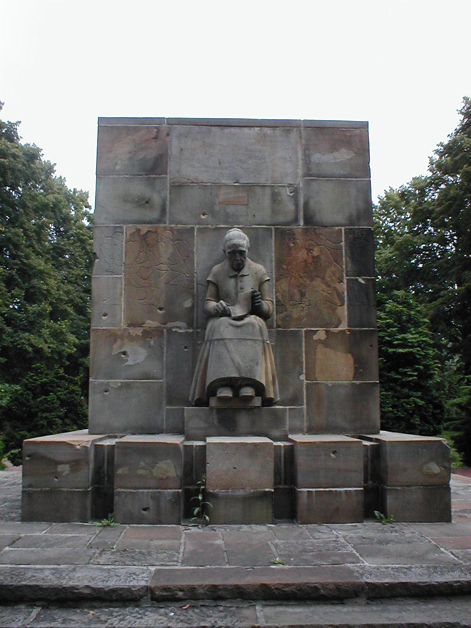 war memorial in Drensteinfurt, Germany